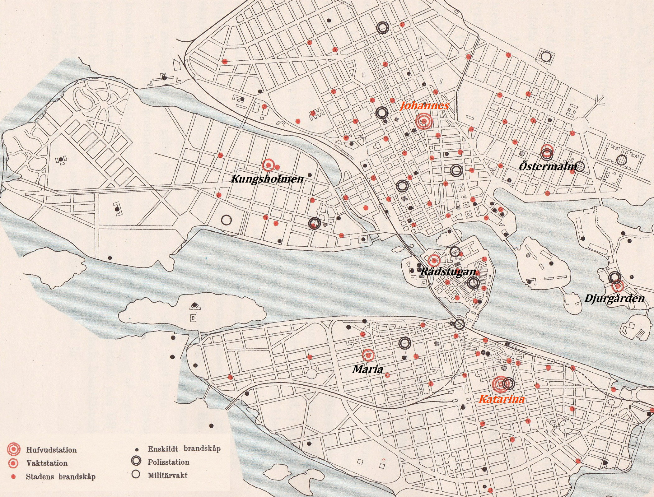 Brand- och polisstationer i Stockholm 1897